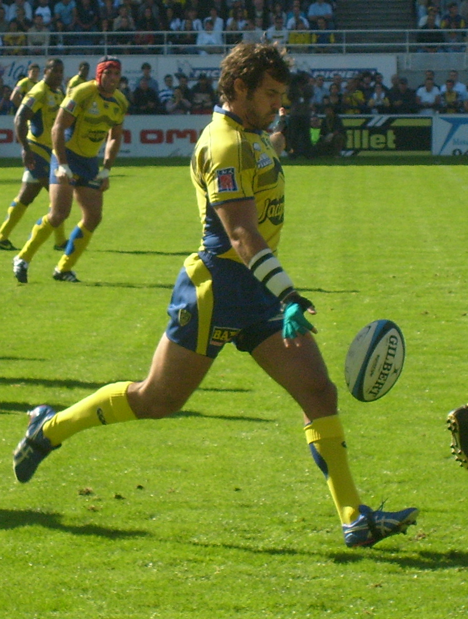 Brock James engage dans les rangs de l'ASM Clermont Auvergne contre l'Aviron Bayonnais au stade Marcel Michelin de Clermont-Ferrand.